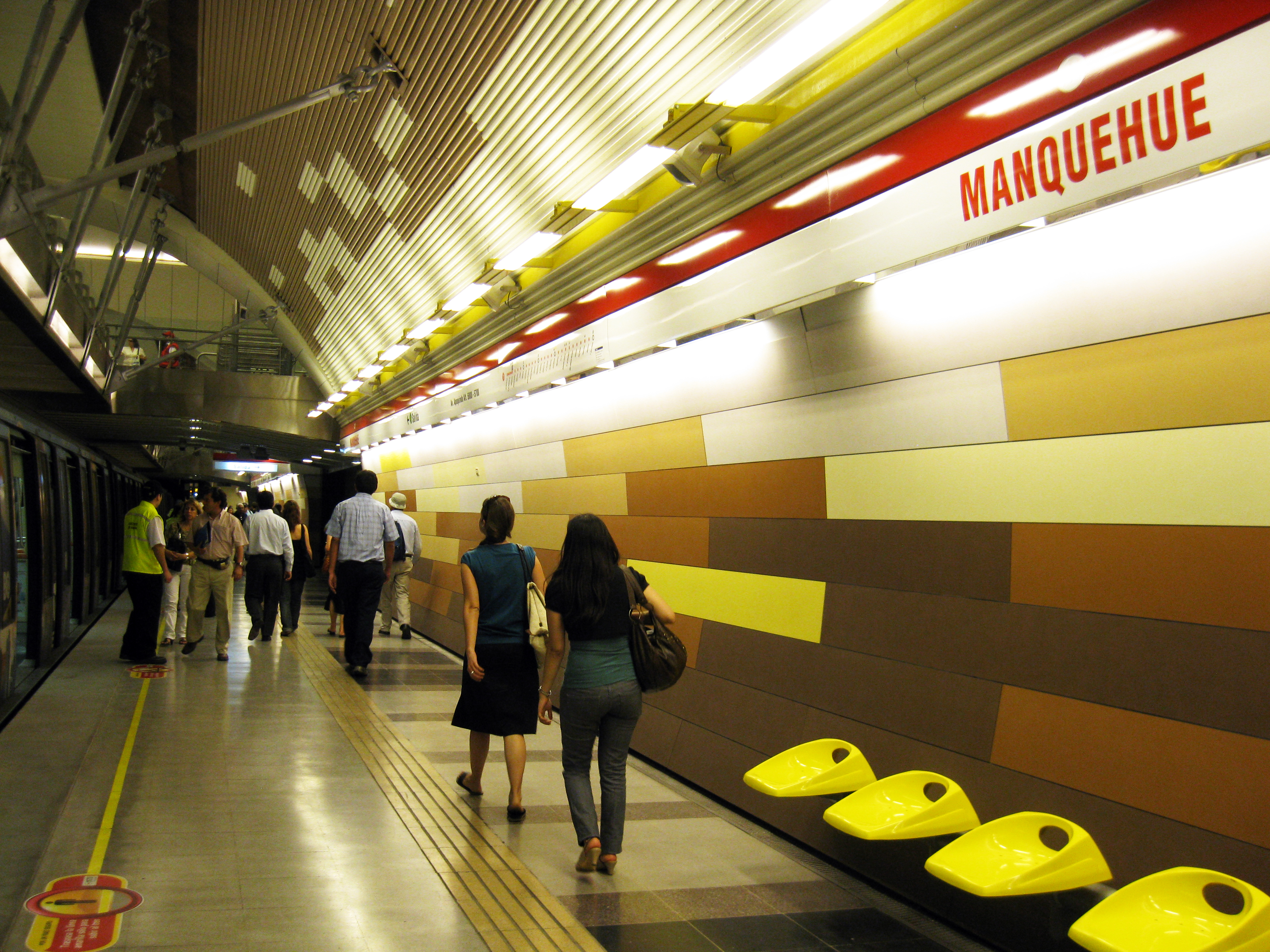 Estación Manquehue, Metro de Santiago